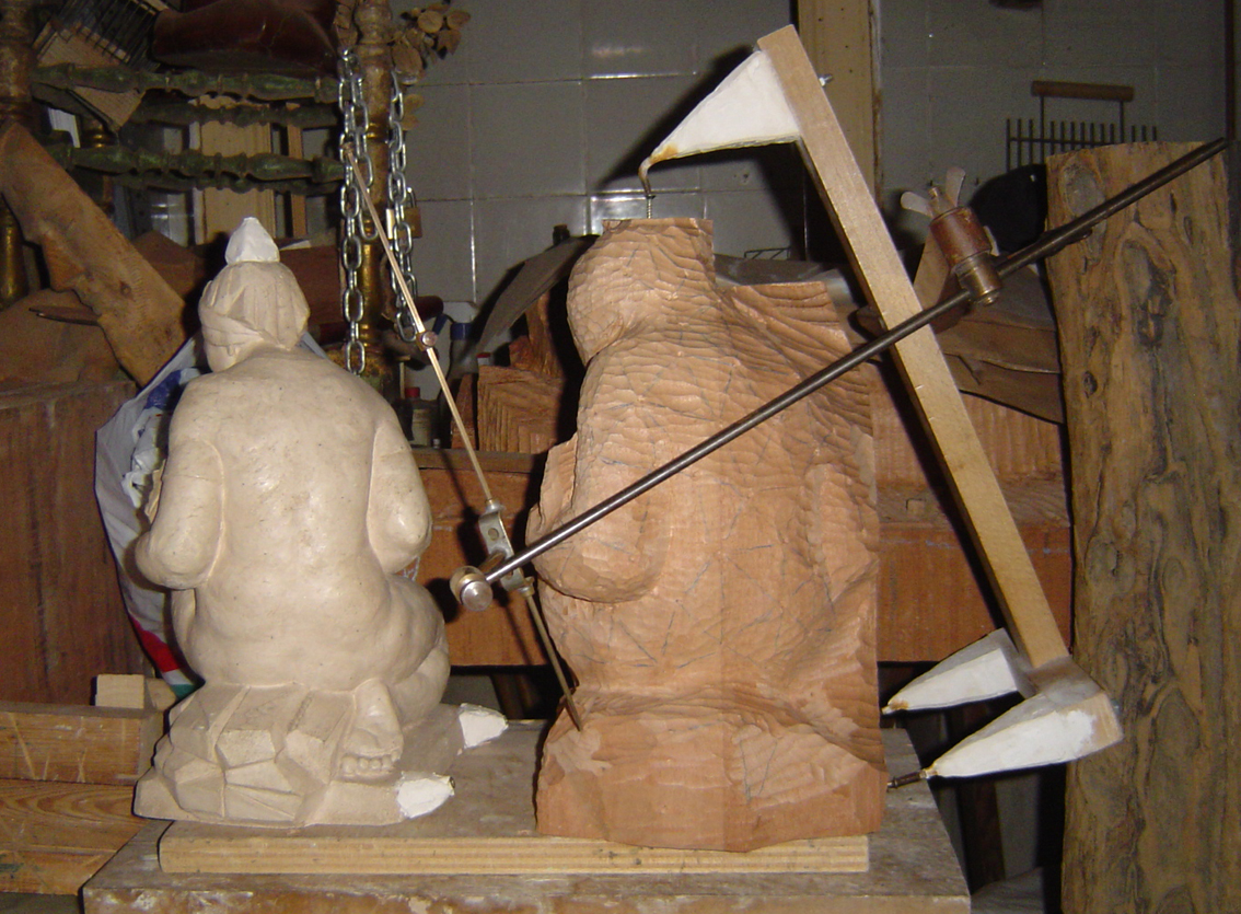 Creación de una escultura utilizando la máquina de sacar puntos